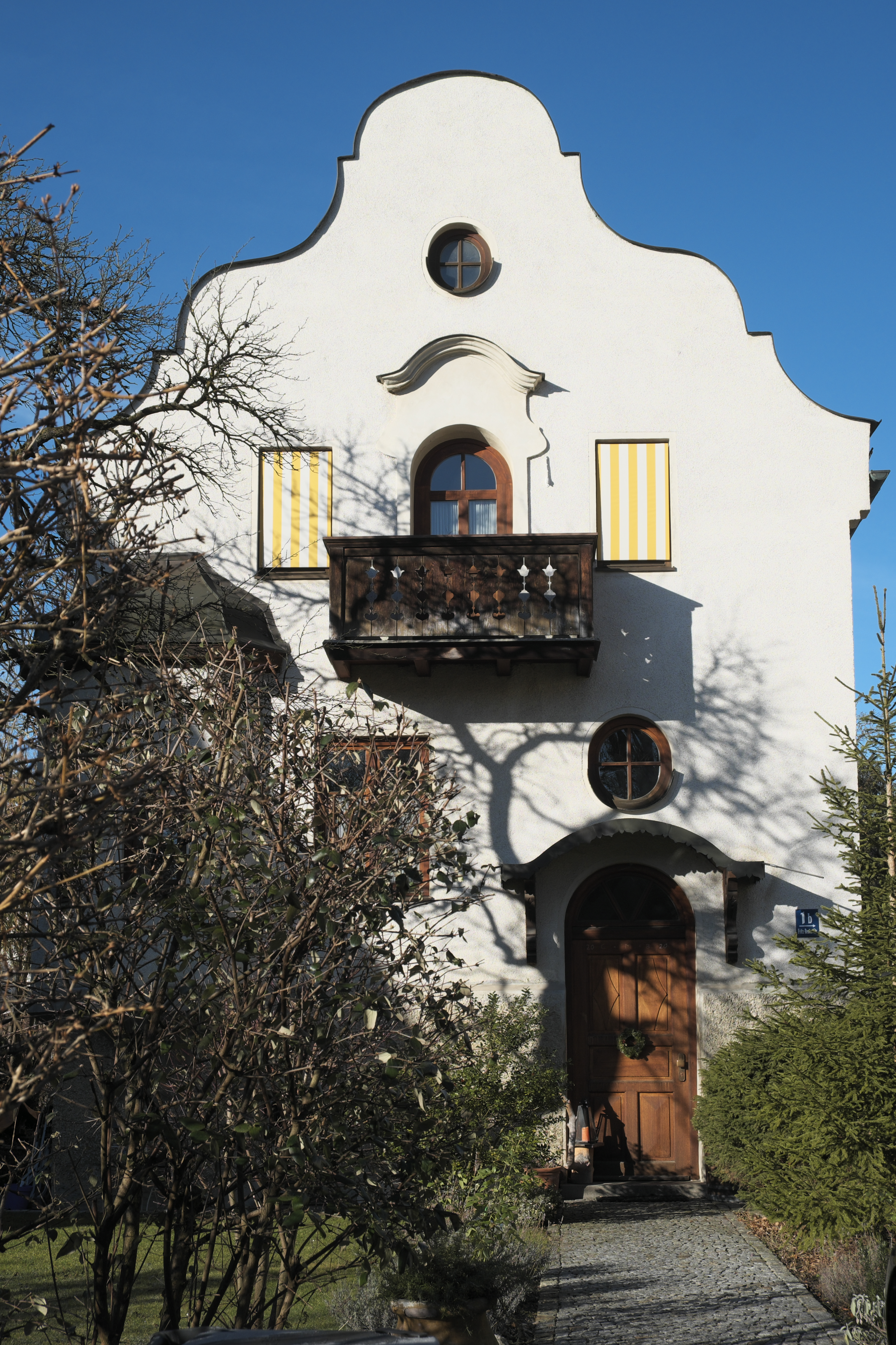 Villa, Fritz-Reuter-Straße 1b (München), in Pasing im Stadtbezirk Pasing-Obermenzing in München (Bayern/Deutschland)